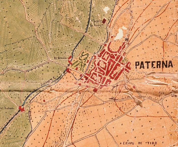 Paterna el 1883 (el nord està a la dreta).